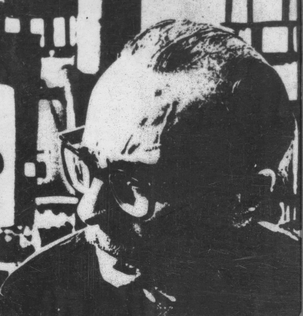 Retrato del escritor, tomado de la portada del libro.